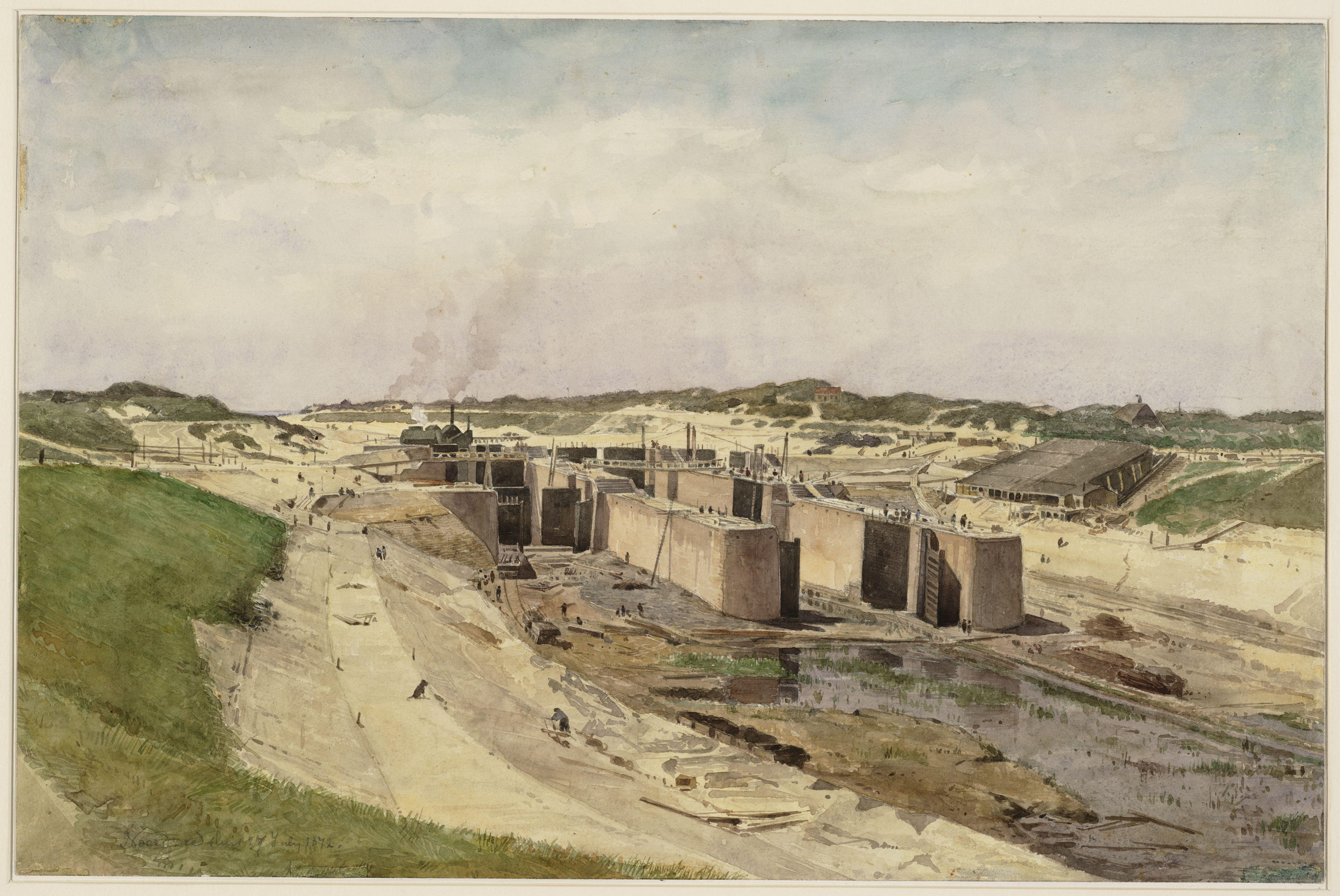 Beschrijving De zeesluizen van het Noordzeekanaal bij IJmuiden in aanbouw. Techniek: aquarel De zeesluizen van het Noordzeekanaal bij IJmuiden in aanbouw. Aquarel Documenttype tekening Vervaardiger Greive jr, Johan Conrad (1837-1891) Collectie Collectie Stadsarchief Amsterdam: tekeningen en prenten Datering 27 juli 1872 Geografische naam Noordzeekanaal Inventarissen Afbeeldingsbestand 010097010633